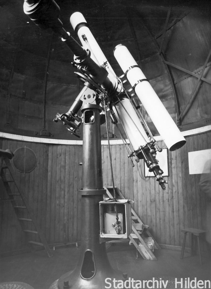 Ansicht der Sternwarte Röttger